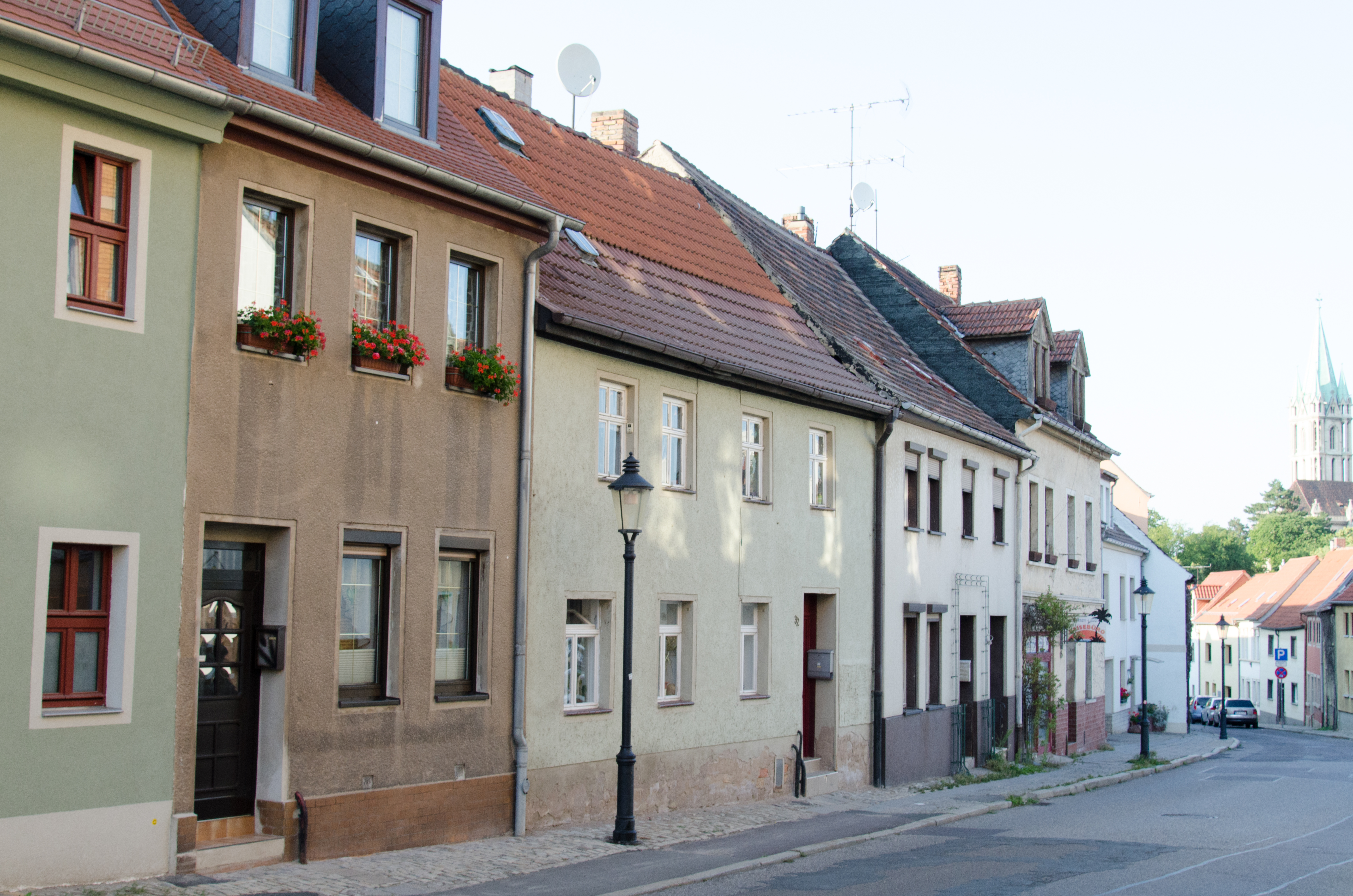 Naumburg, Neuengüter 32, 31, 30